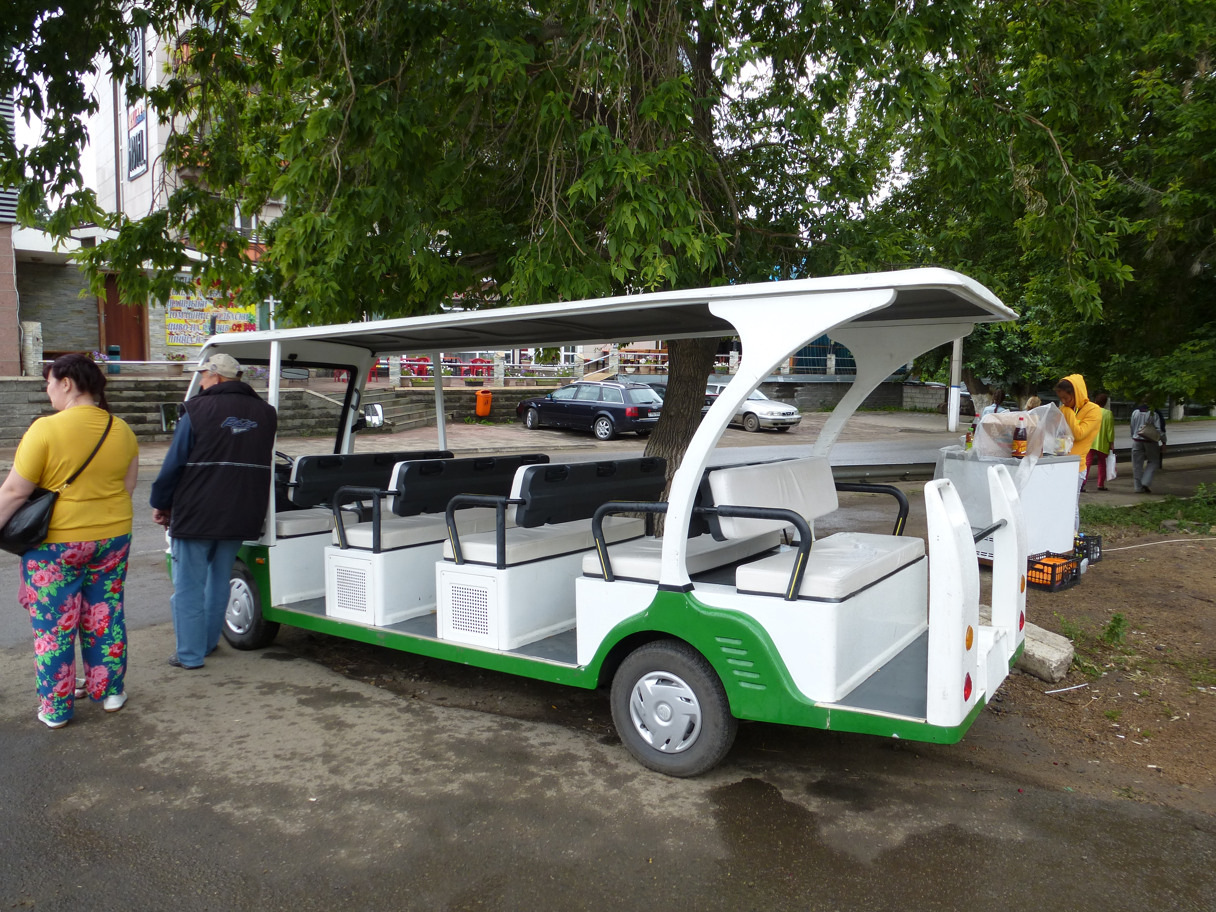 15-местный прогулочный электроавтобус китайского производства. Боровое. Казахстан.